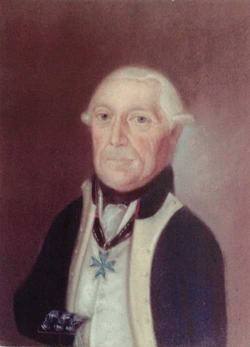 Christoph Friedrich von Mosch* (25. September 1733 in Altdorf bei Sagan; † 22. Juli 1821 in Berlin) königlich preußischer General-Lieutenant und Ritter des Ordens Pour le Mérite